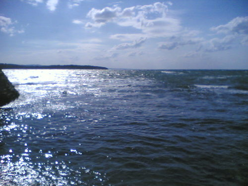 Kerpe sahilinden deniz manzarası